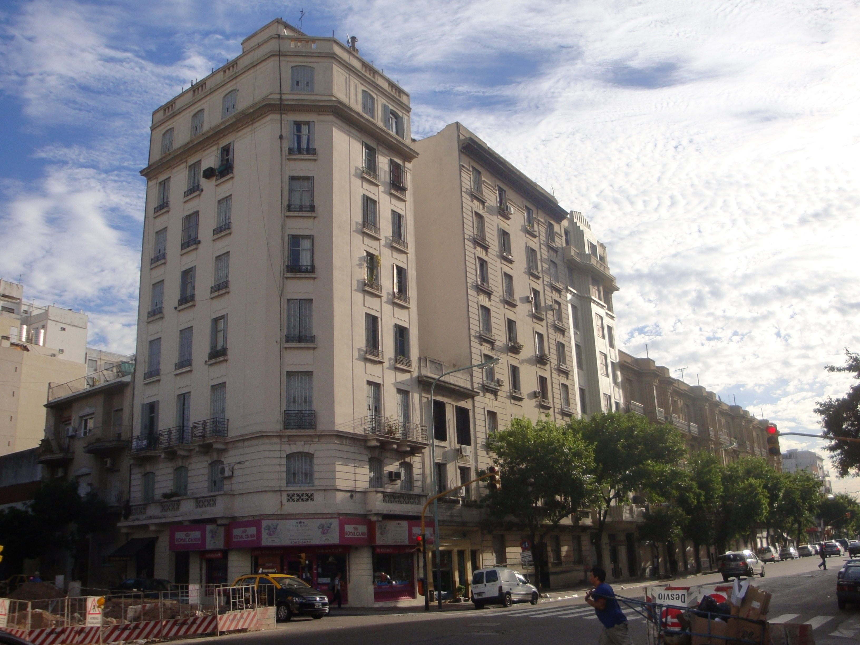 La Avenida Juan de Garay en su intersección con la calle Piedras, en Buenos Aires.